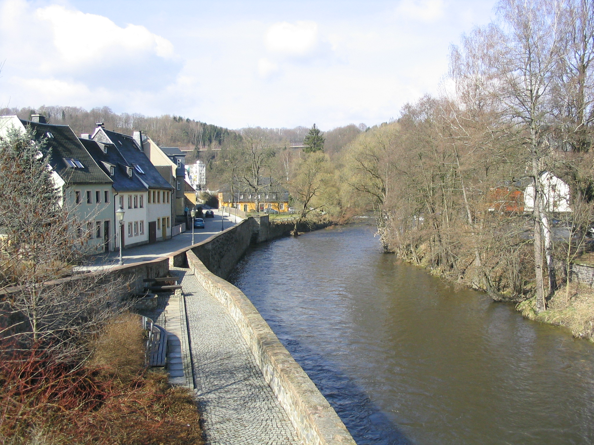 Zschopau, Blick von der Brücke in die Spinnereistraße, im Hintergrund die neue Brücke der B 174. Aufgenommen am 15.04.2006 von Dr. Hagen Graebner